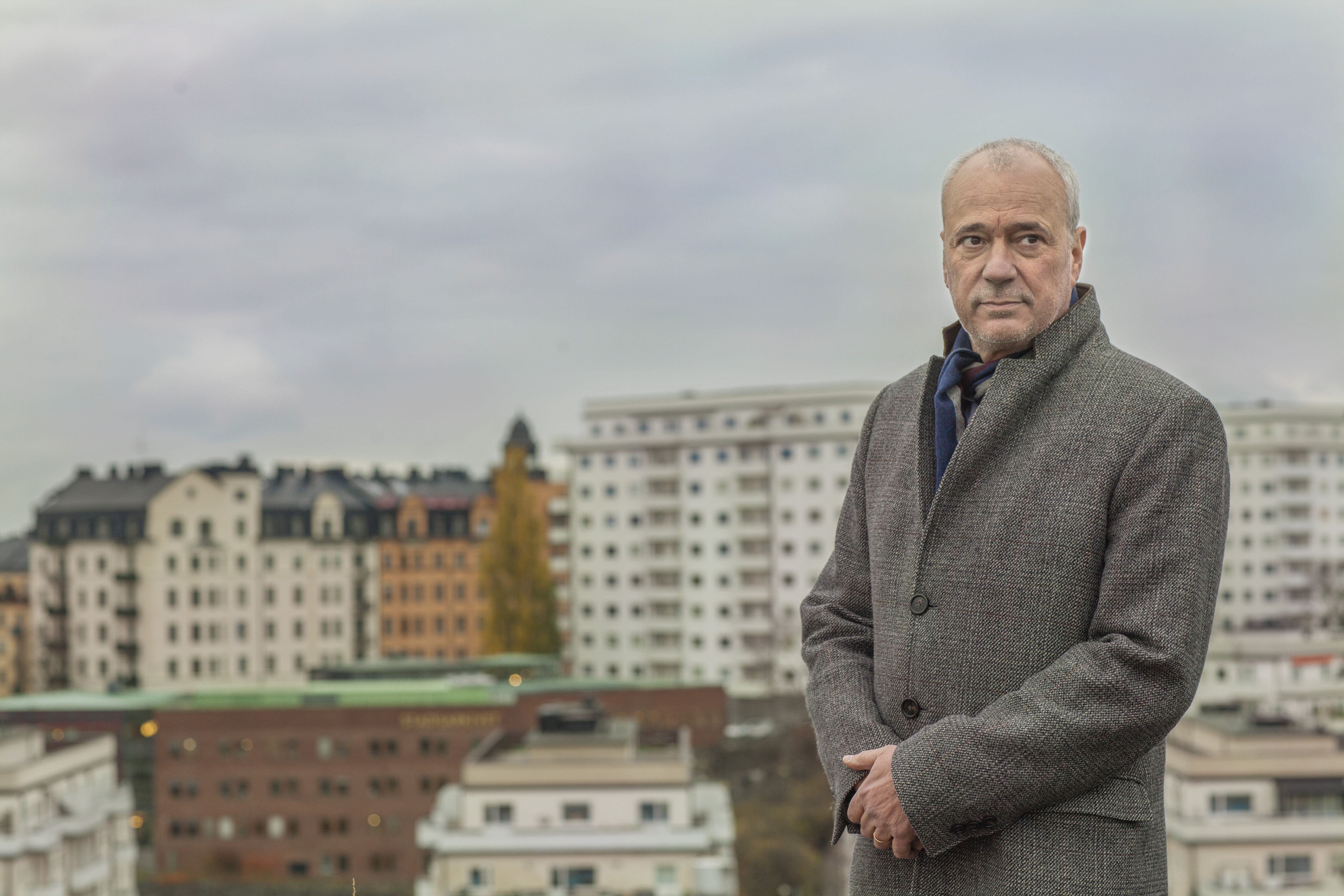 Den svenska journalisten Richard Aschberg.